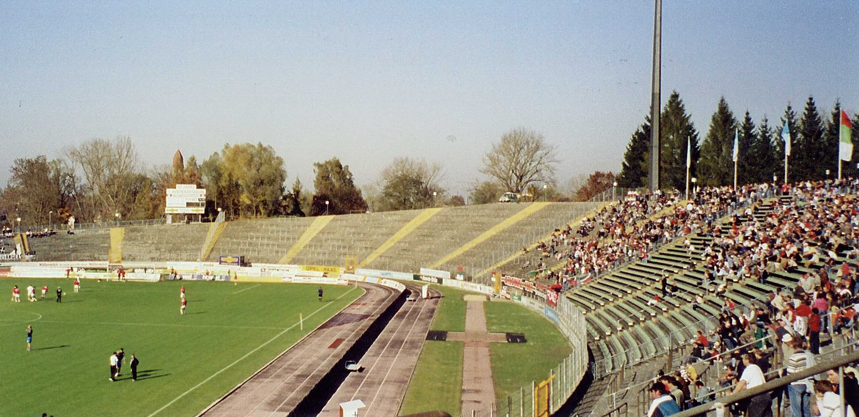 Augsburger Rosenaustadion, Nordkurve